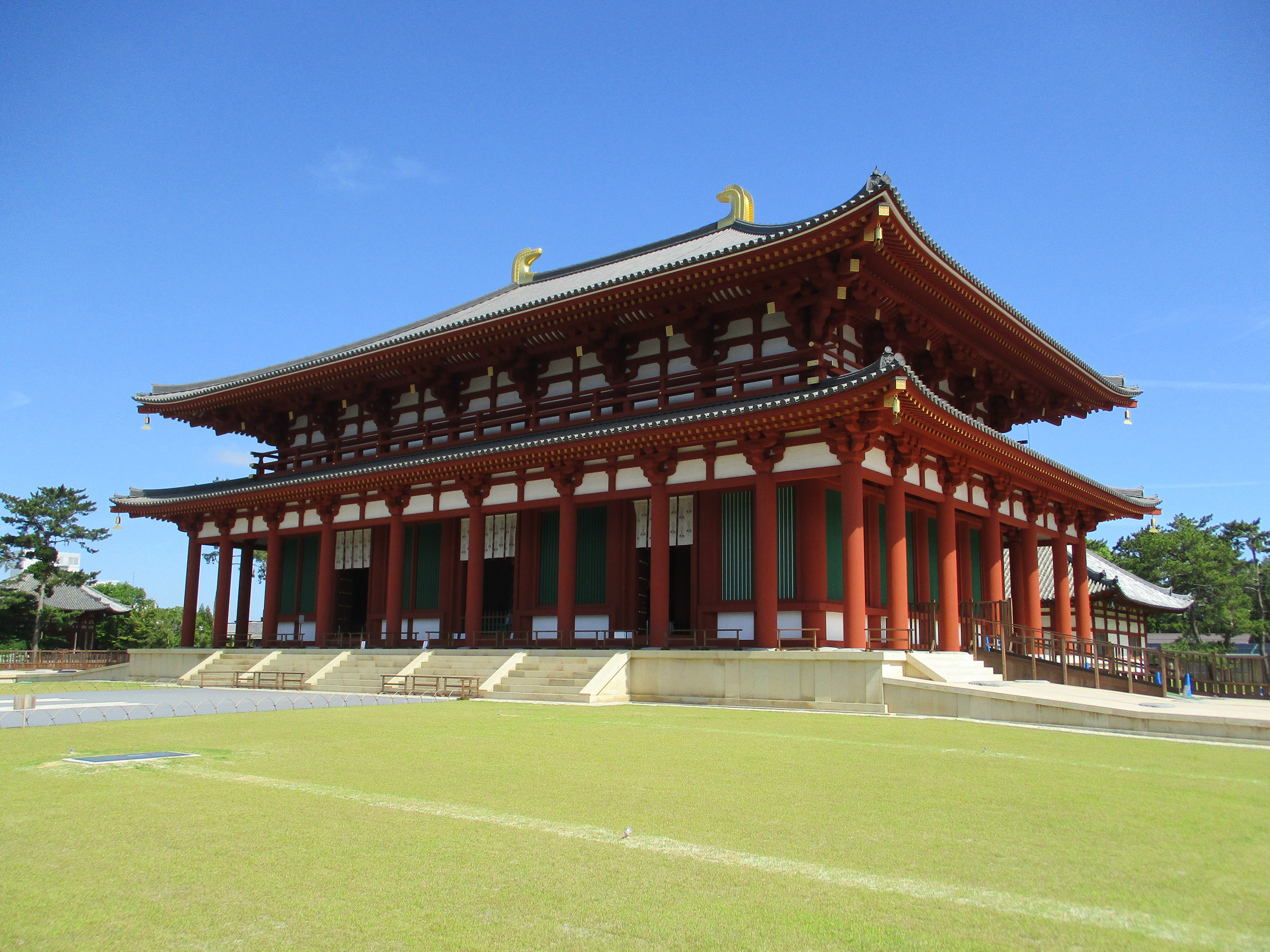 客家語/Hak-kâ-ngî: Nai-liòng Hîn-fuk-sṳ̂ Chûng-kîm-thòng.